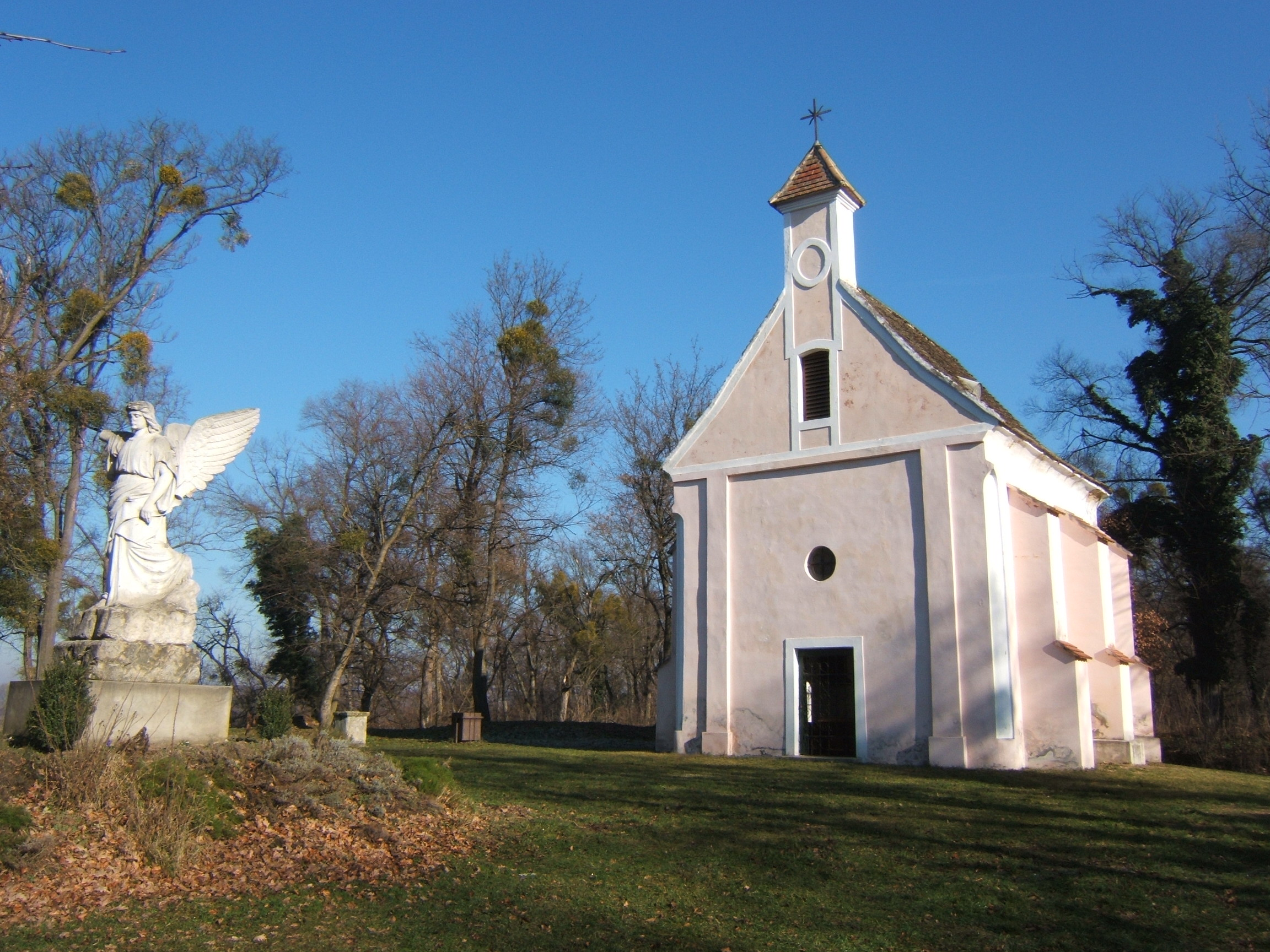 Somogyzsita, szőcsénypusztai kápolna